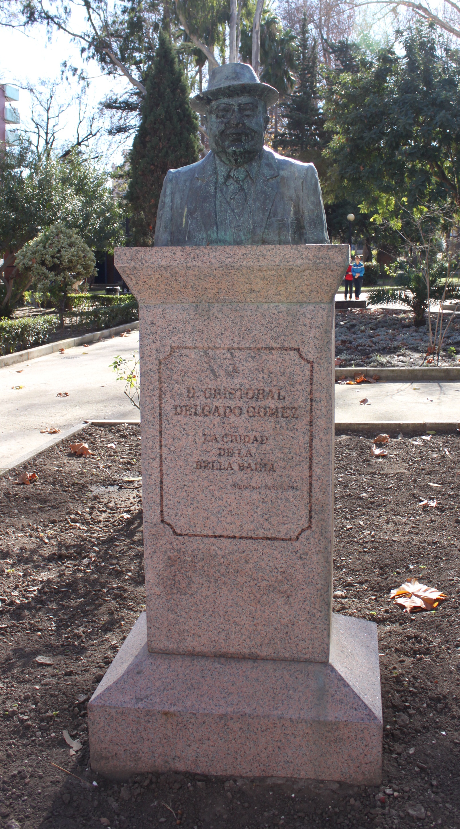 Busto del escritor Cristóbal Delgado Gómez en el parque María cristina de Algeciras, Andalucía, España.